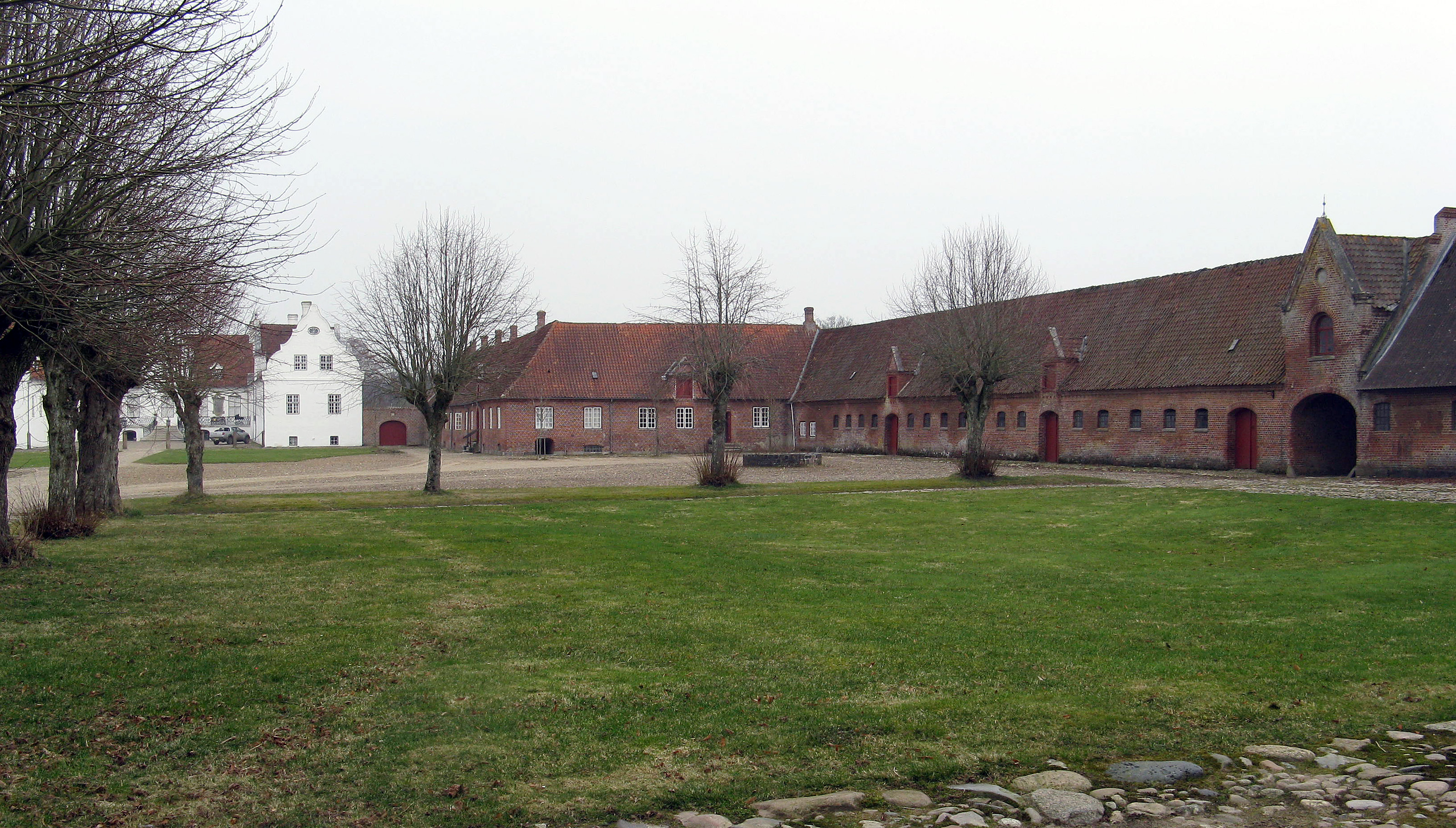 Bidstrup set fra gårdspladsen